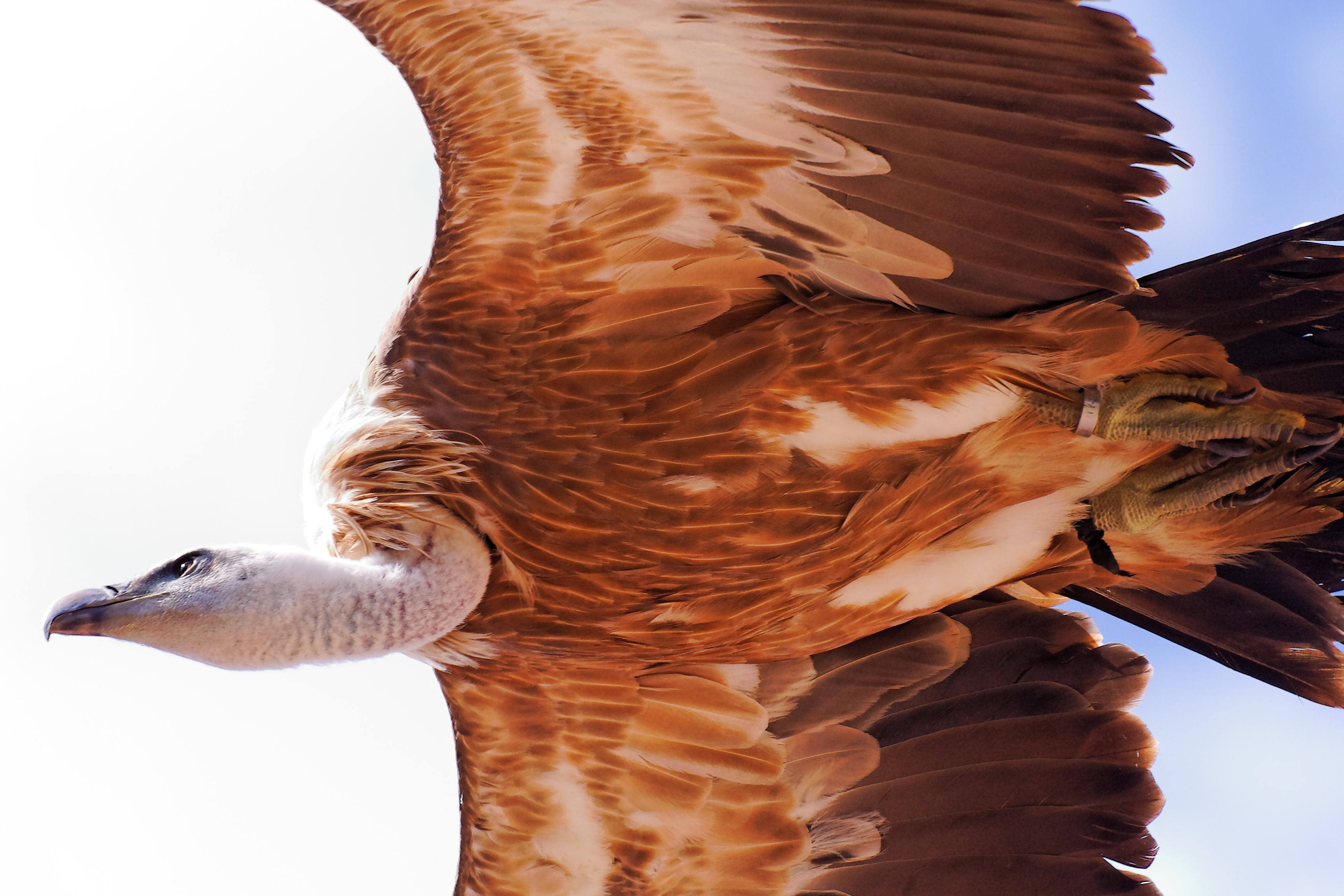 Un vautour Fauve au Puy du Fou